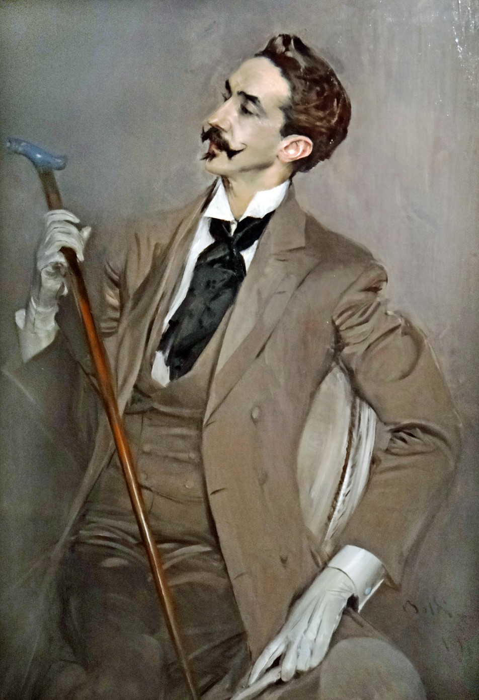 Don d'Henri Pinard au nom du comte Robert de Montesquiou, 1922 Ce tableau est présenté dans la remarquable exposition du couturier d'origine belge Dries Van Noten qui se tient actuellement au musée des arts décoratifs. Il fait partie d'une des oeuvres sélectionnées par le couturier qui l'ont inspiré au cours de sa carrière. Site de l'exposition Dries Van Noten - Inspirations